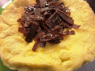 թթու լավաշով կամ պաստեղով ձվածեղ